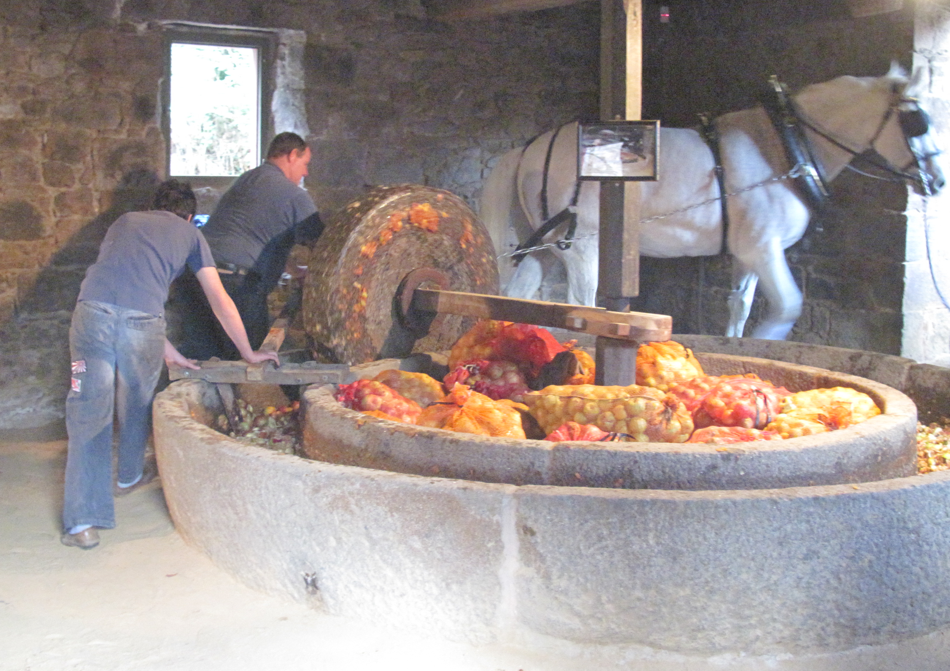 Nrf: Faîs'sie d'Cidre, 17-18 d'Octobre 2009, Jèrri